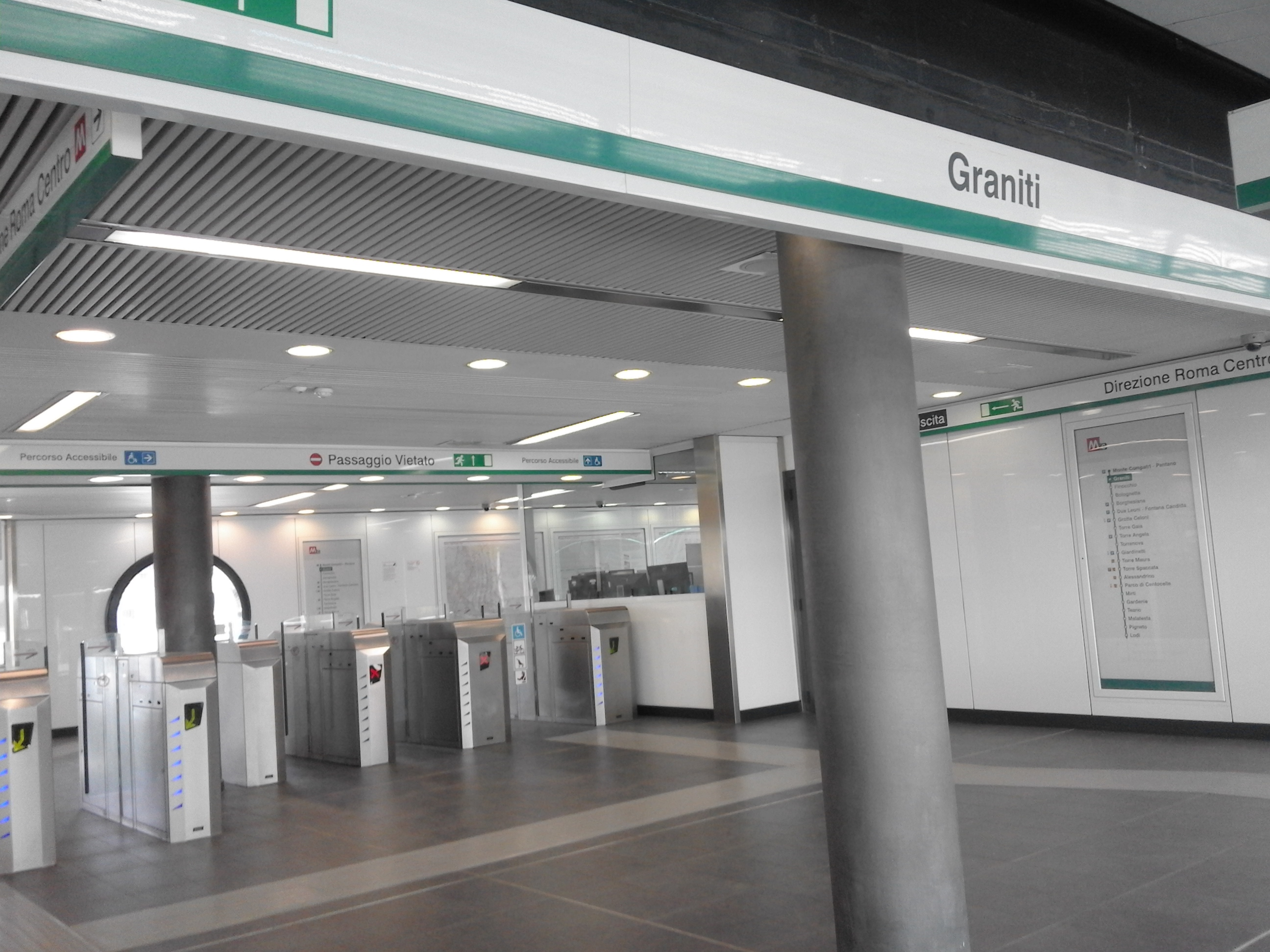 Metropolitana di Roma linea C - Graniti